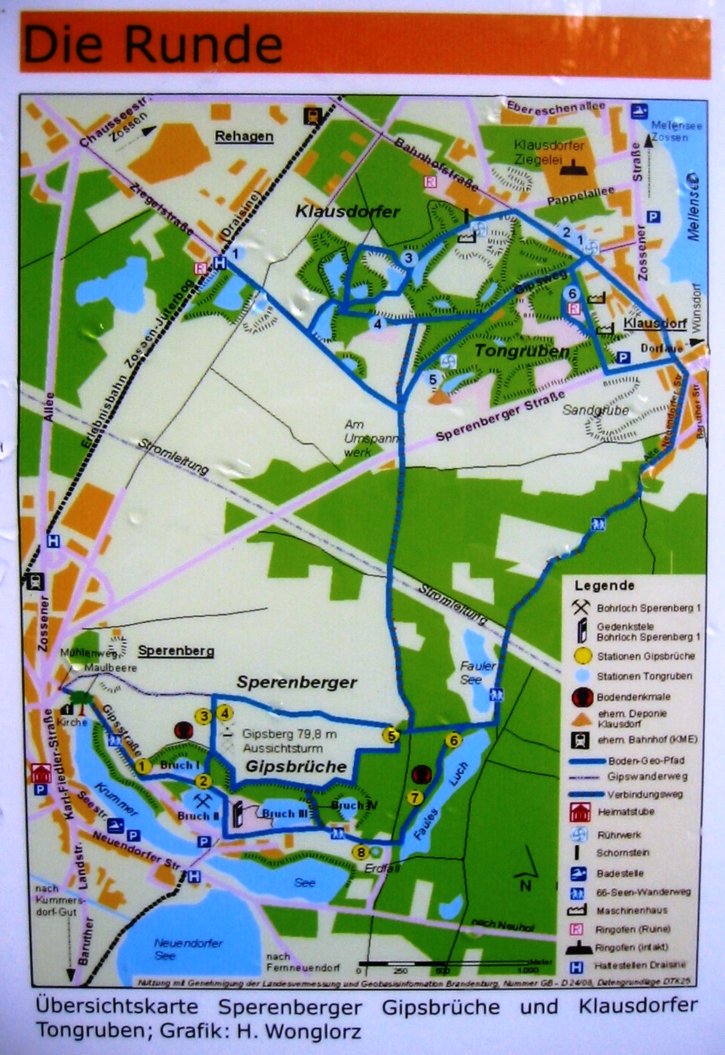 Übersichtskarte des Boden-Geo-Pfads, der durch die beiden Bereiche „Klausdorfer Tongruben“ und „Sperenberger Gipsbrüche“ (teilweise Naturschutzgebiet) im Landkreis Teltow-Fläming (Brandenburg) führt. Aufnahme von einer öffentlich zugänglichen Informationstafel des „Boden-Geo-Pfads“ in Sperenberg.